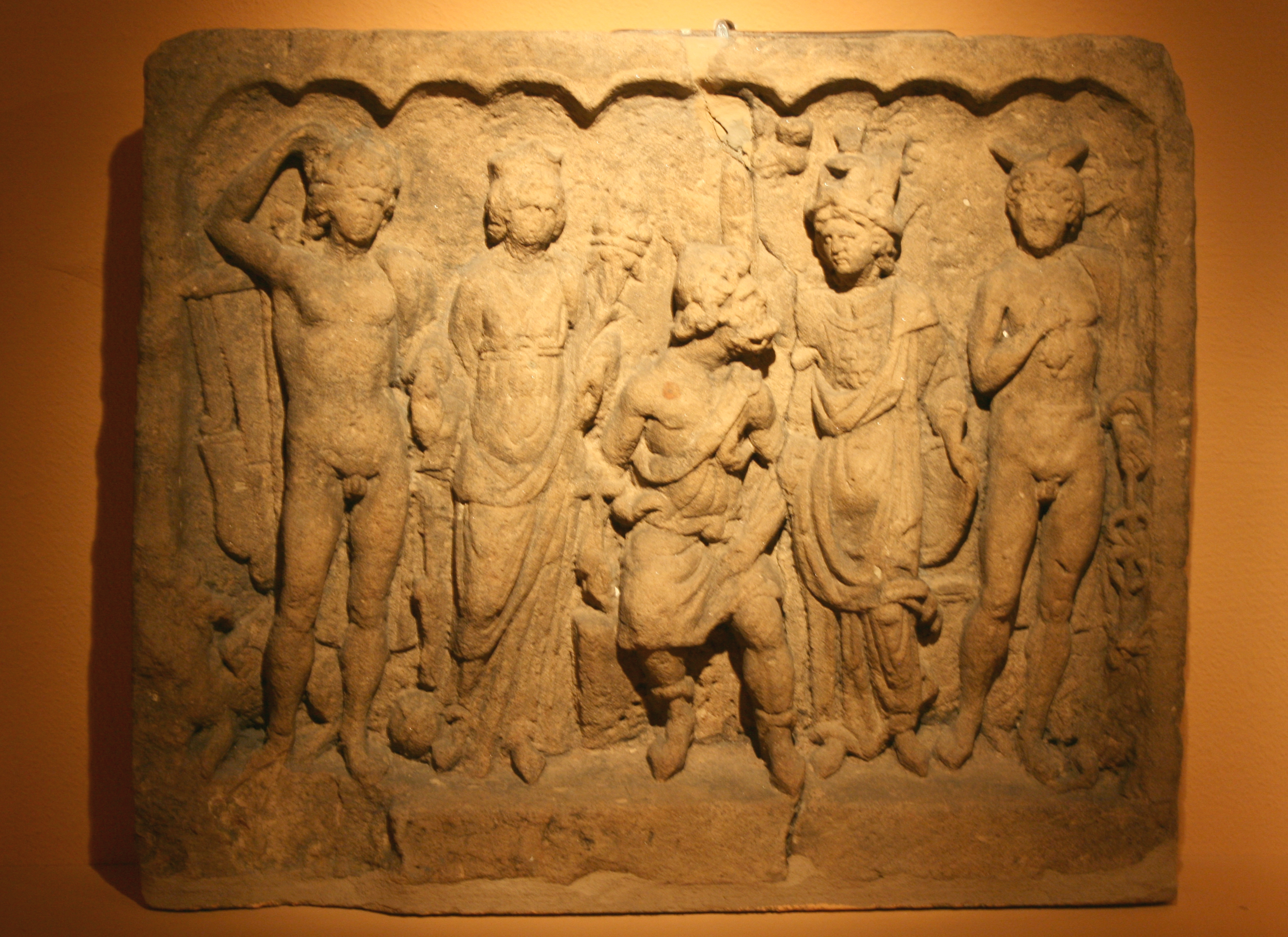 Fünfgötterstein aus Rheinzabern im Historischen Museum der Pfalz in Speyer.